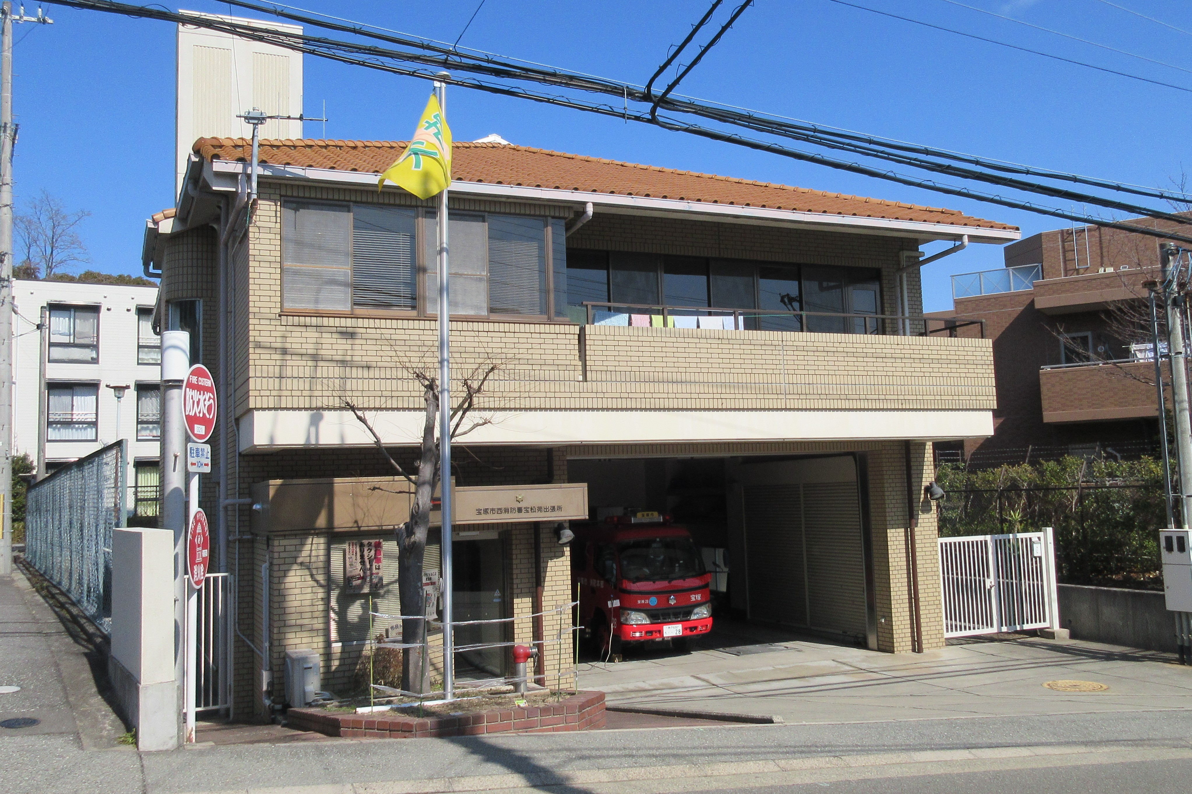 宝塚市西消防署宝松苑出張所